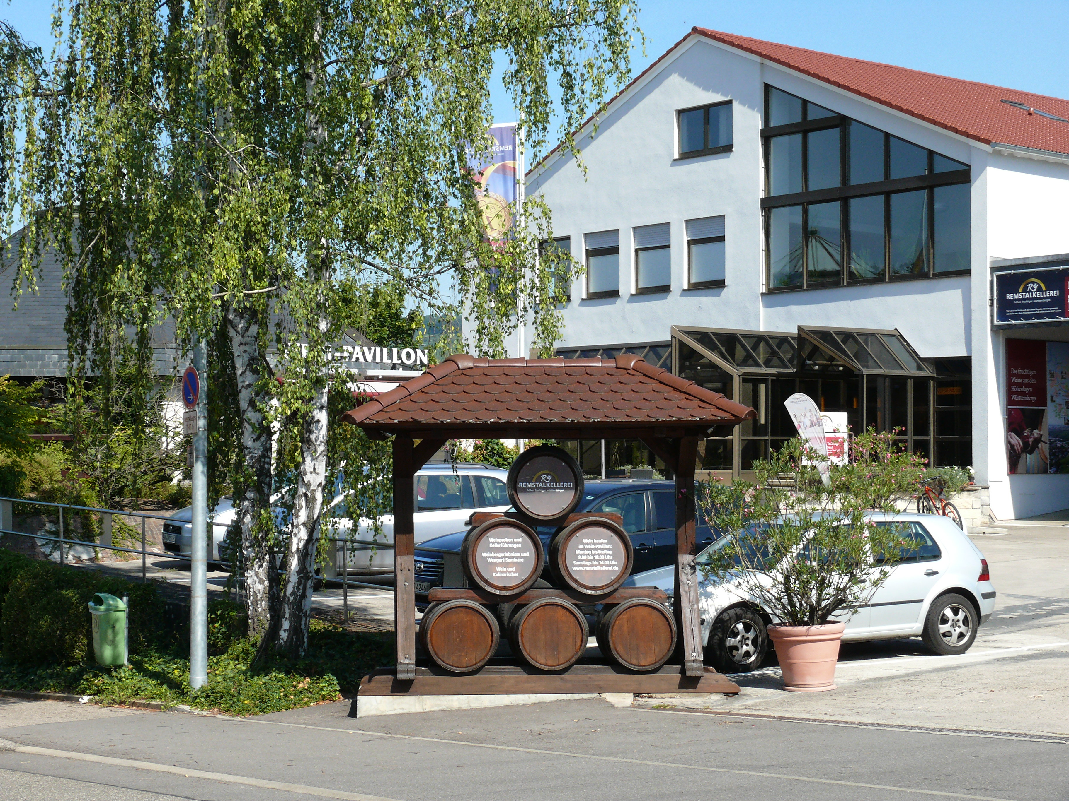 Die ausgezeichnete Remstalkellerei in Weinstadt-Beutelsbach.